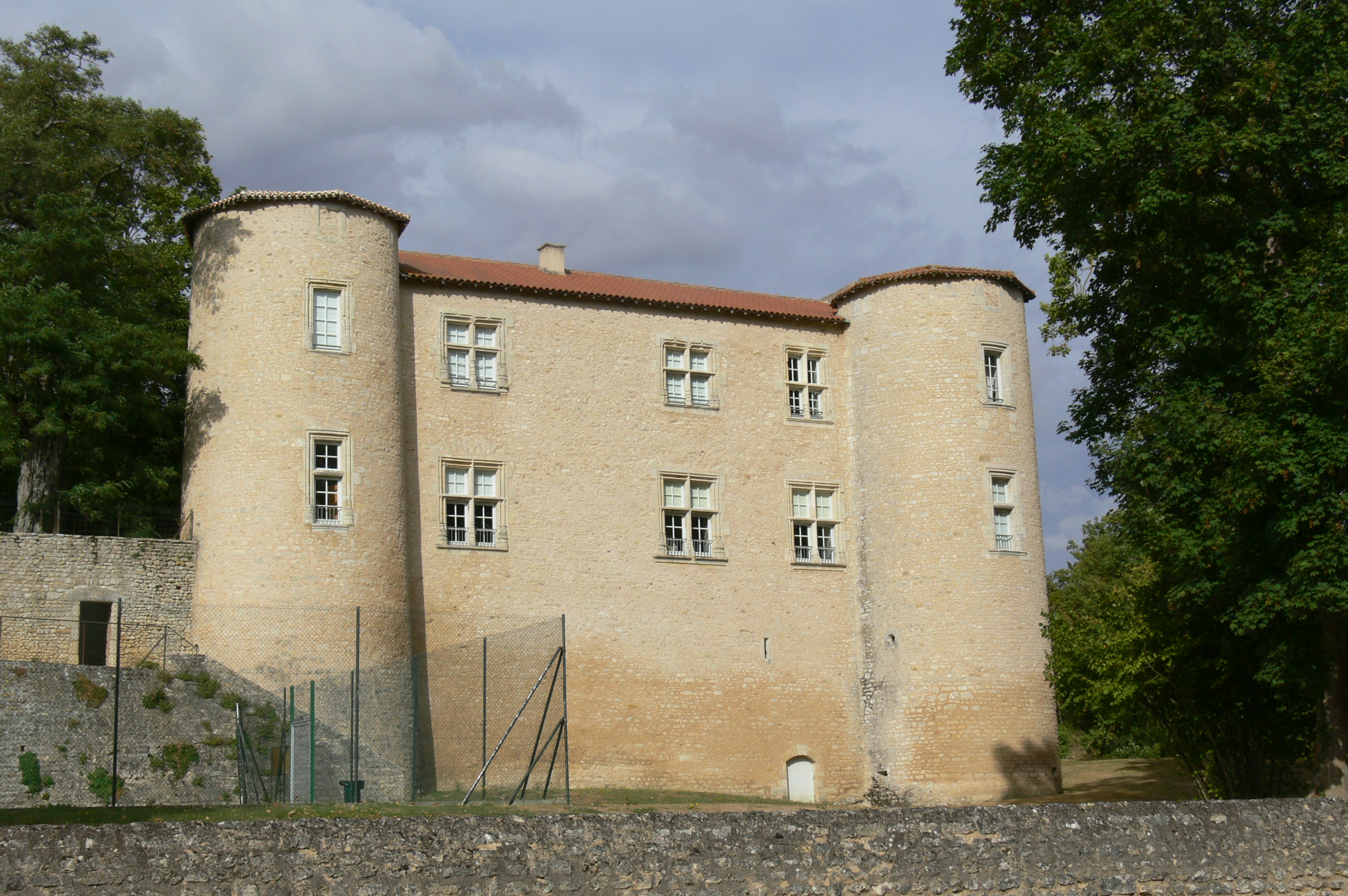 Château d'Ayron, (Inscrit, 1999) .